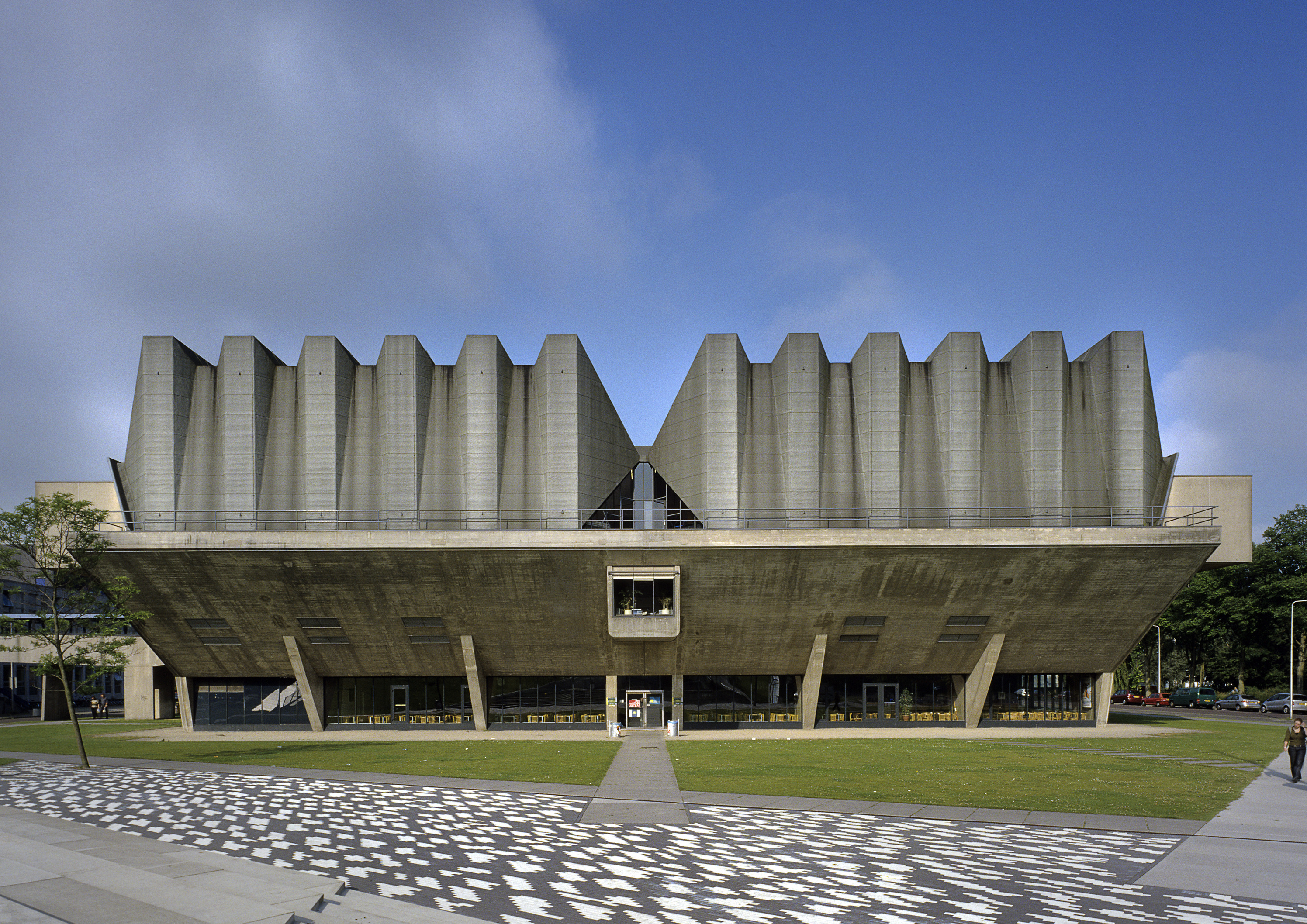 TECHNISCHE UNIVERSITEIT, AULA: Overzicht van de voorgevel met entree (opmerking: Gefotografeerd voor Toonbeelden van de Wederopbouw)